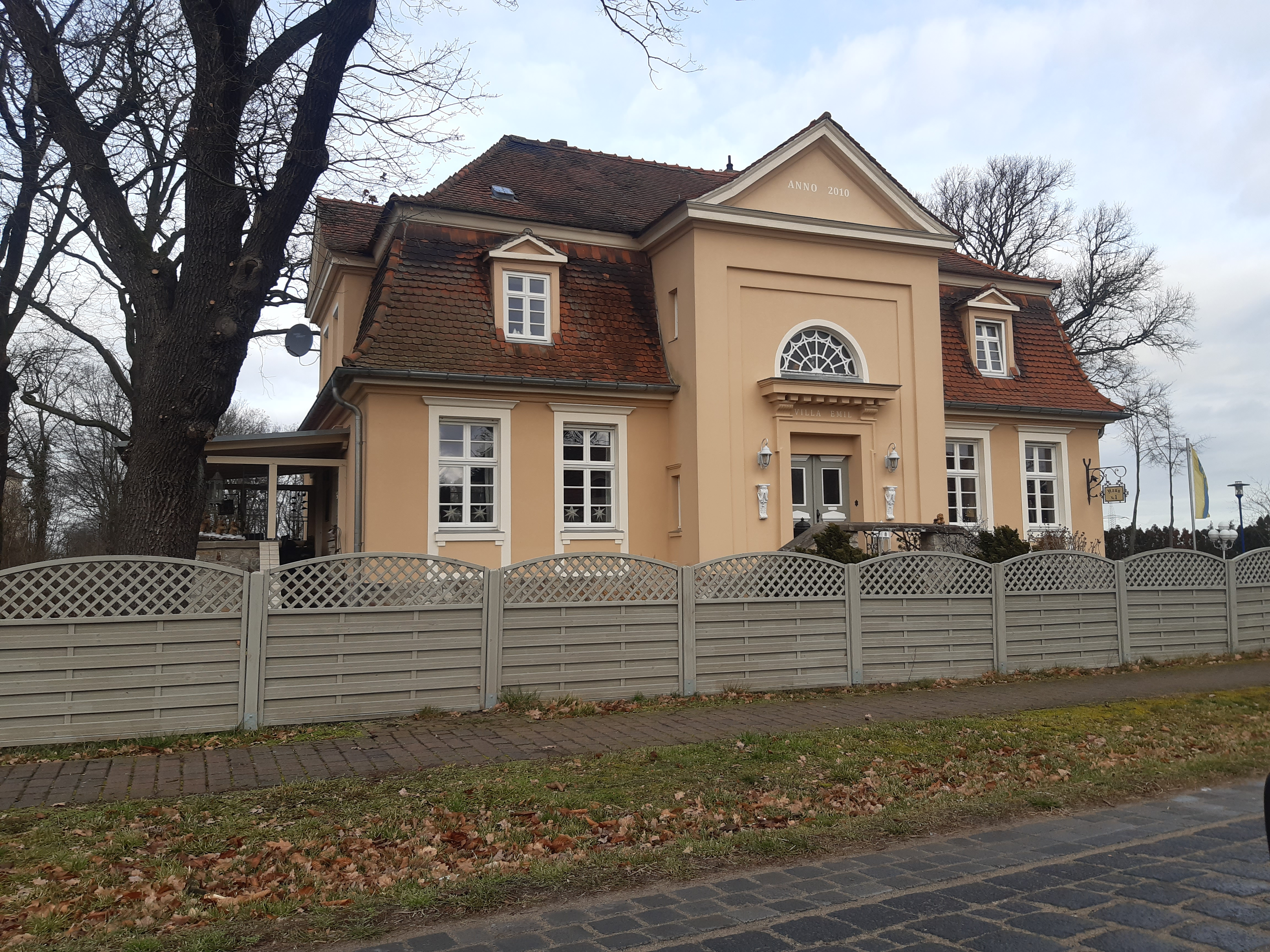 Villa